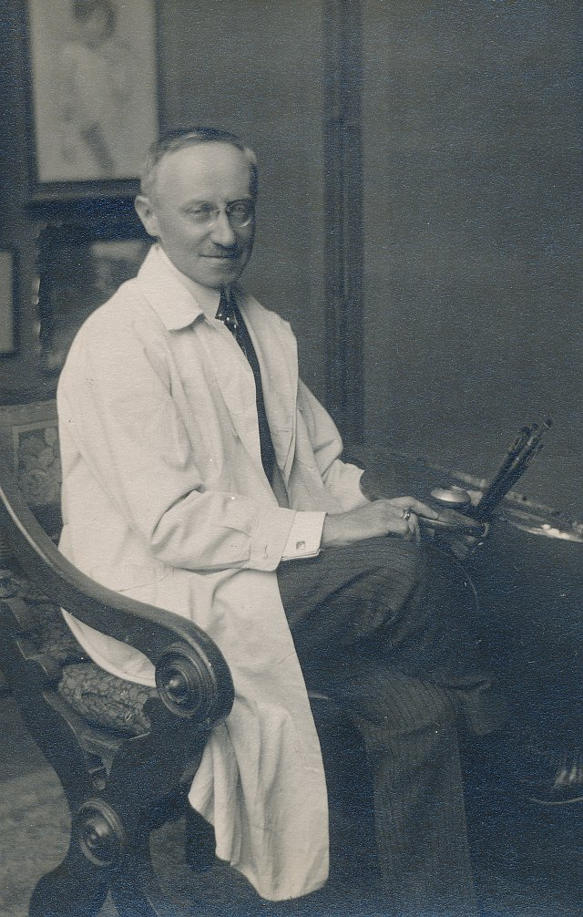 Malíř Otto Peters v ateliéru 9. 11. 1930